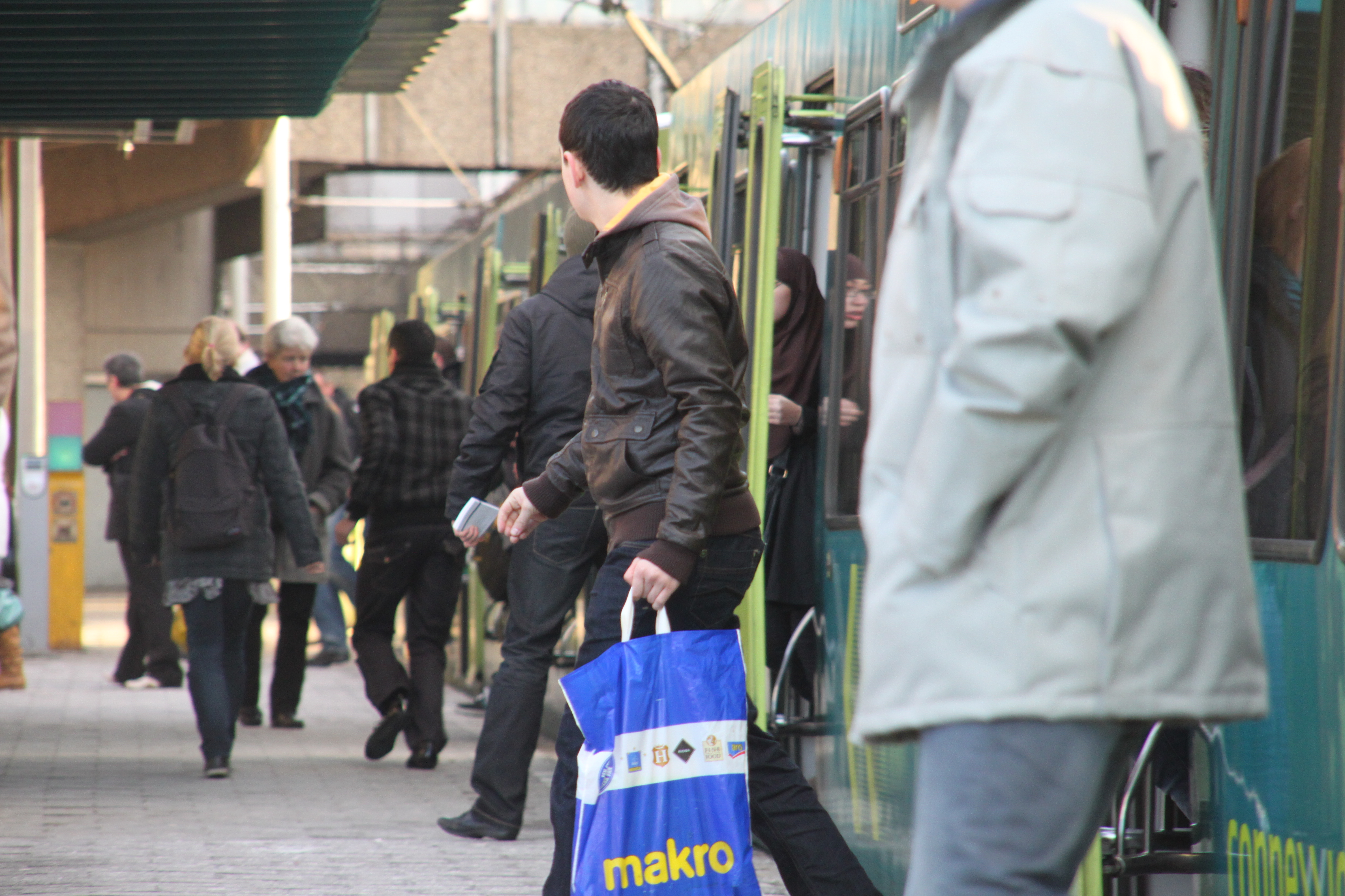 Reizigers stappen uit de sneltram bij het eindpunt op het Centraal Station van Utrecht.